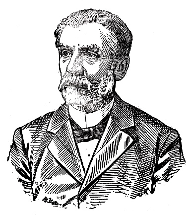 Gustaf Rudebeck, landshövding i Västernorrlands län.